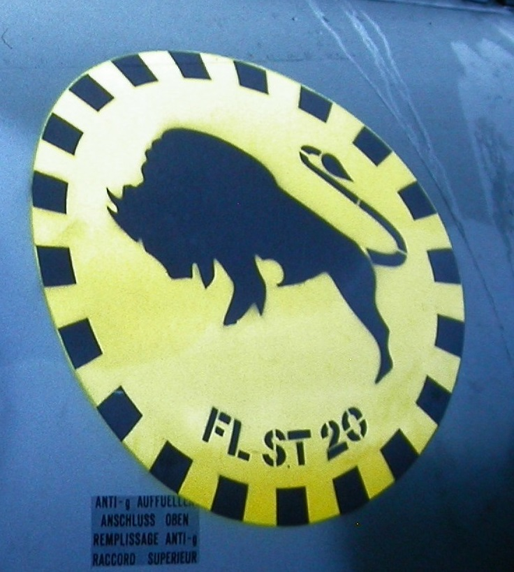 Swiss Air Force Squadron 20 Emblem